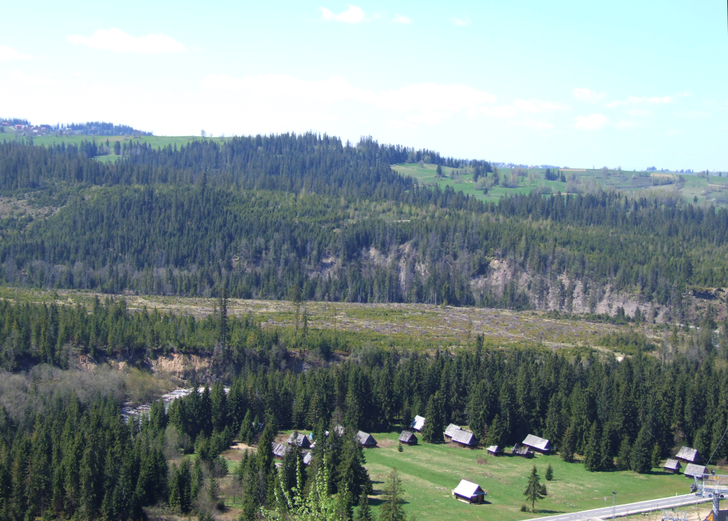 Polana Podokólne w Jurgowie, dolina Jaworowego Potoku, dolina Białki i Brzegowski Wierch